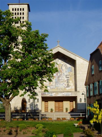 Volmunster